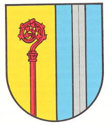 Wappen von Gries (Landkreis Kusel)